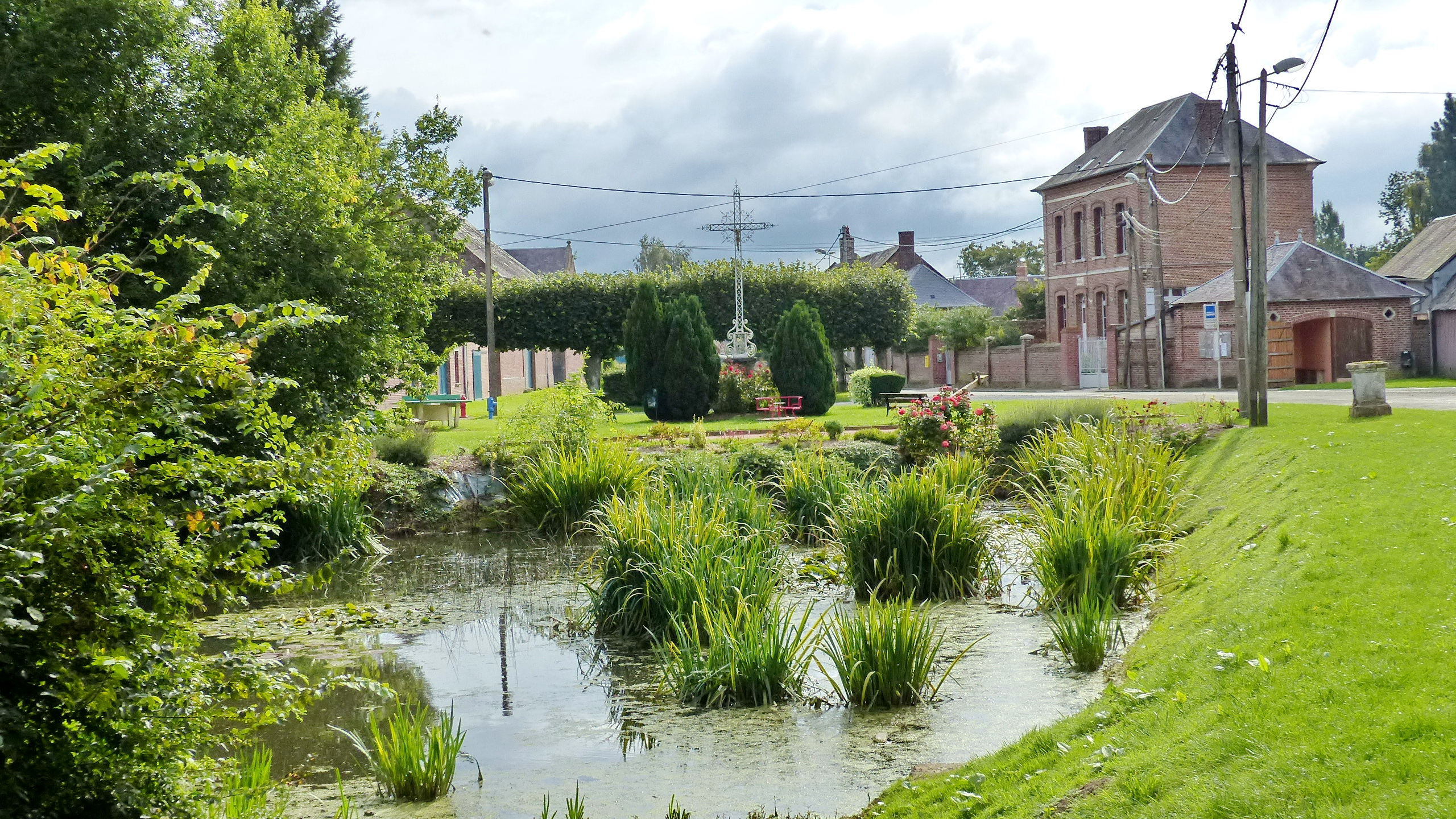 Mare, Place de l'Eglise et Mairie de Choqueuse-les-Bénards